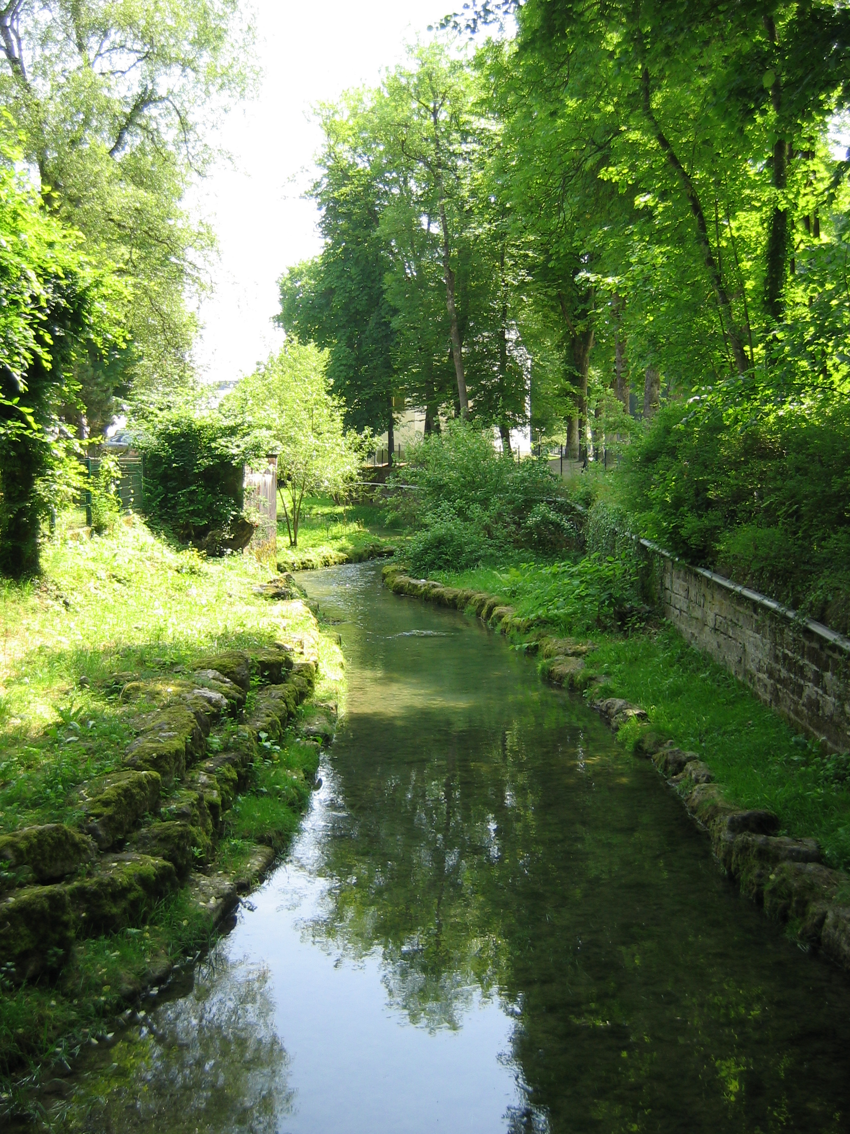 Vair, rivière traversant le parc thermal de Contrexéville, Vosges, Lorraine, France